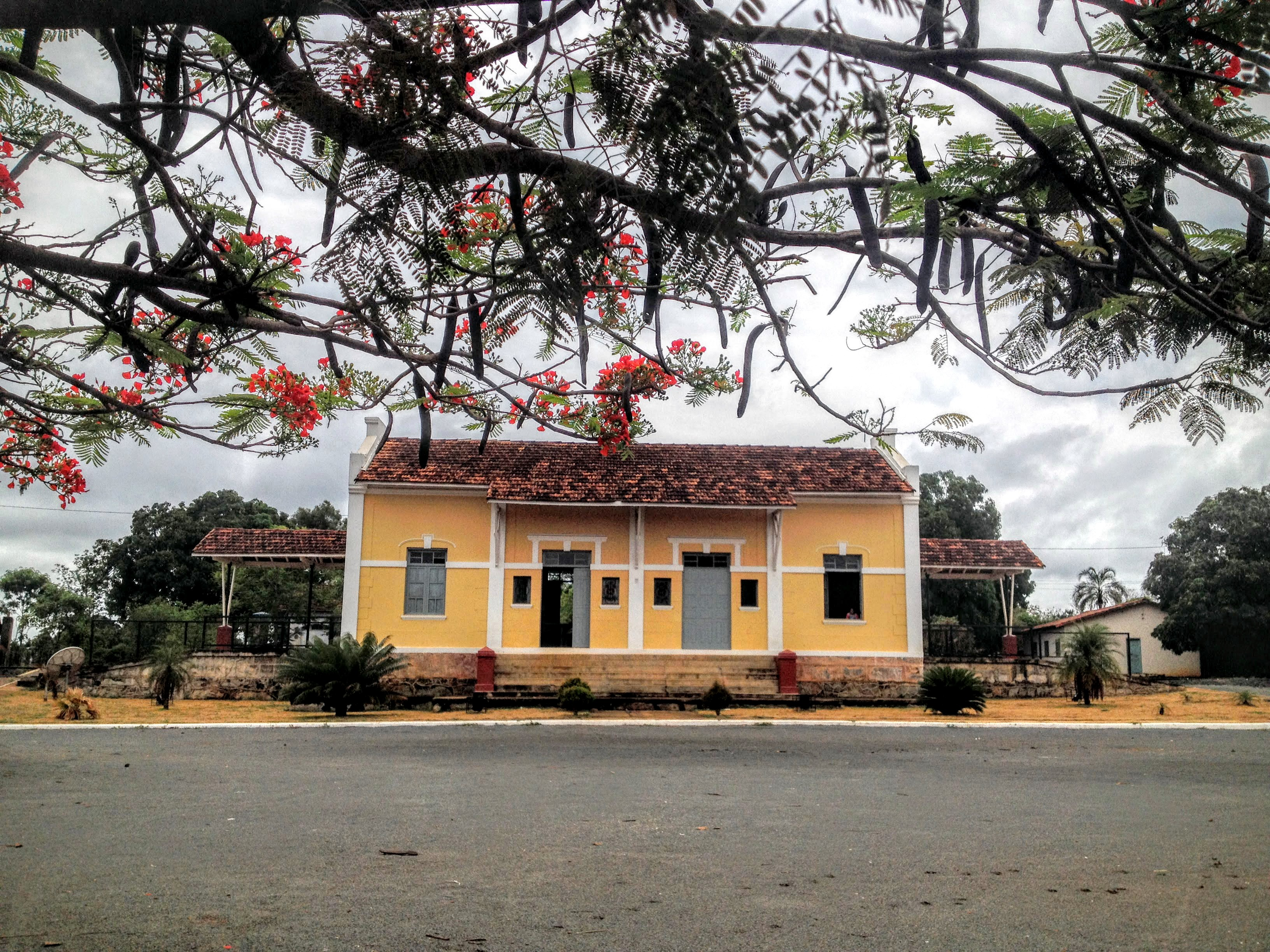 Estação Museu de Vianópolis Goiás